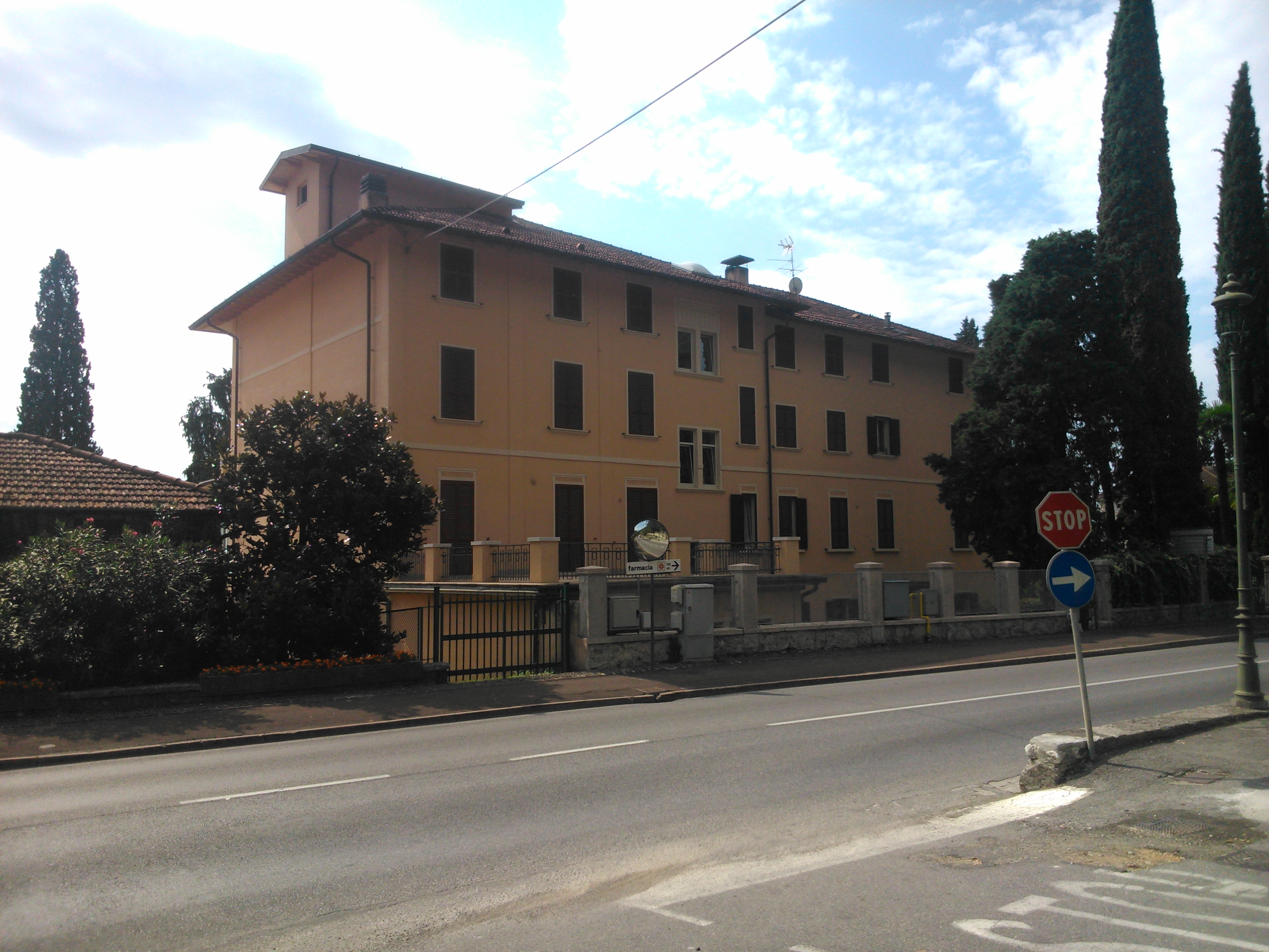 villa Maria Elisabetta a Gardone Riviera in provincia di Brescia